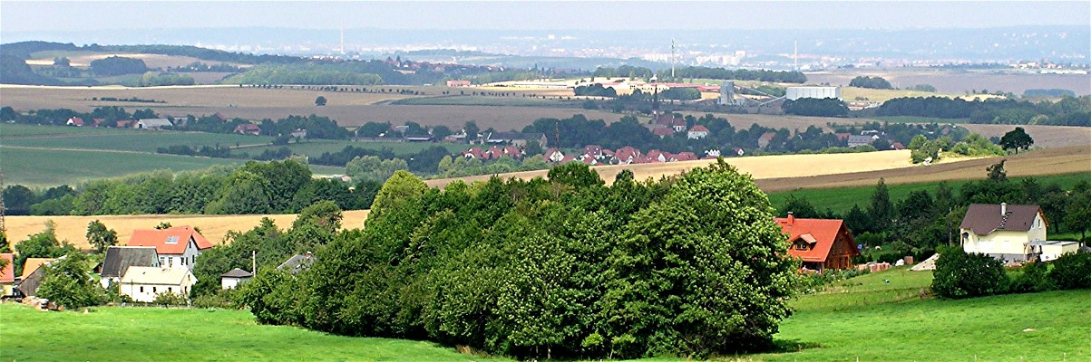 Blick über Gersdorf nach Friedrichswalde (Bahretal) Fotograf: Gert Hänsel Andere Versionen